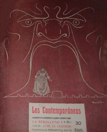 Portada de La Rebolledo.